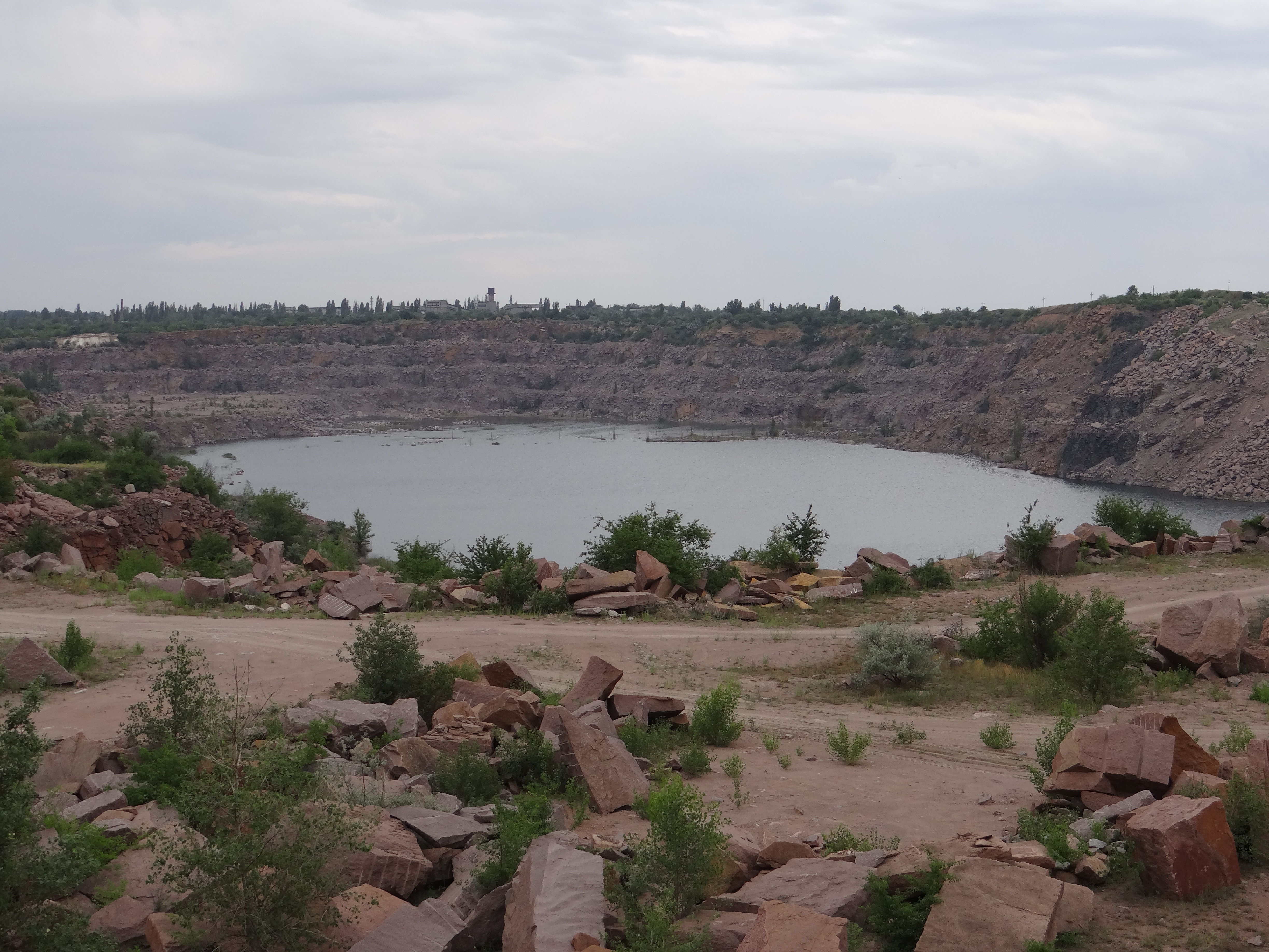 Токівський гранкар'єр